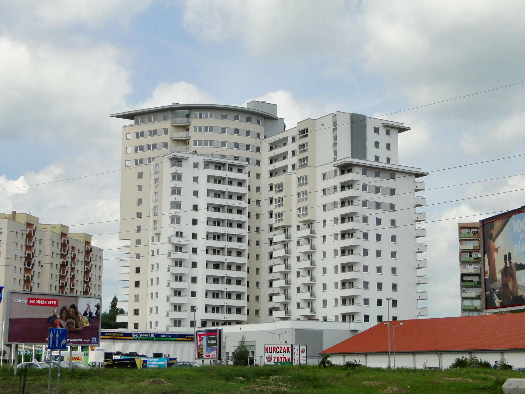 Wieżowiec Widok na Osiedlu Bandurskiego w Szczecinie